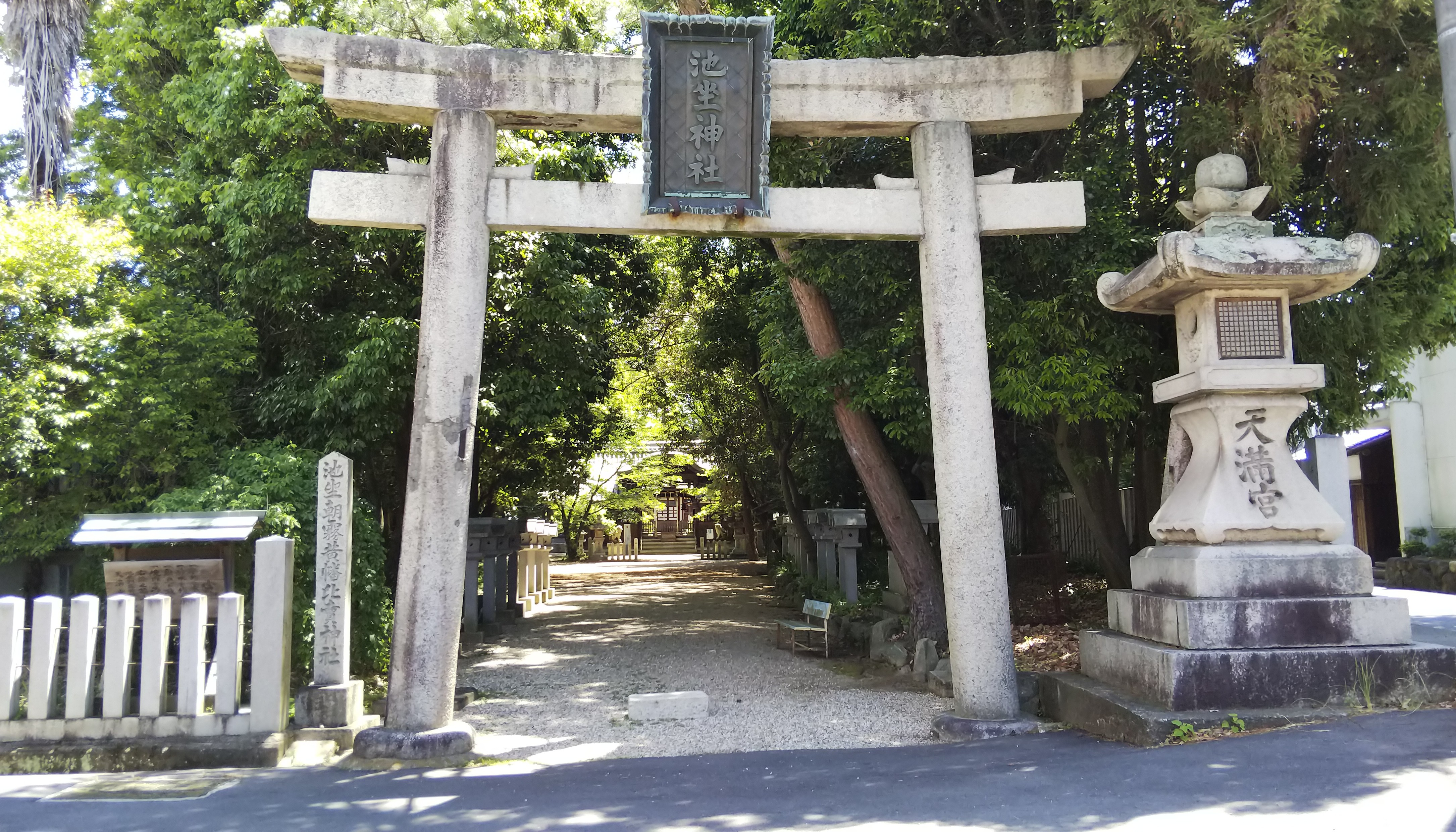 池坐朝霧黄幡比売神社鳥居